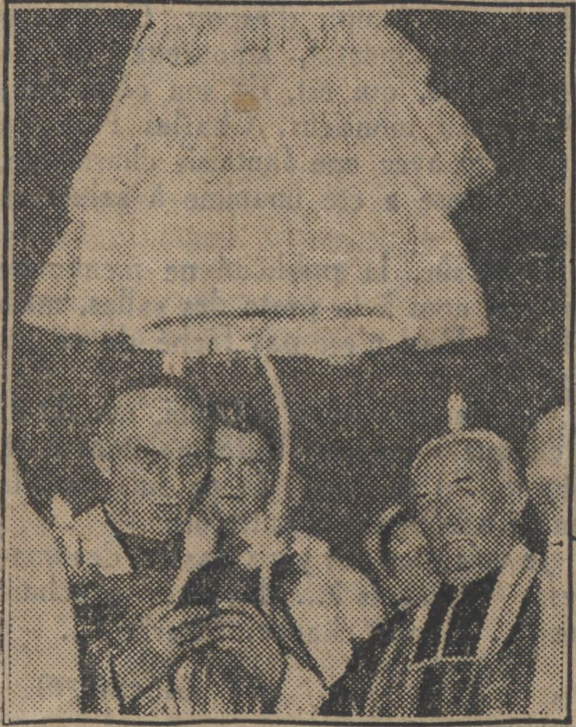 Baptême de cloches par Monseigneur Verdier et l'abbé Duvaux, curé de la paroisse de Saint-Jean-l'Évangéliste en Montmartre.